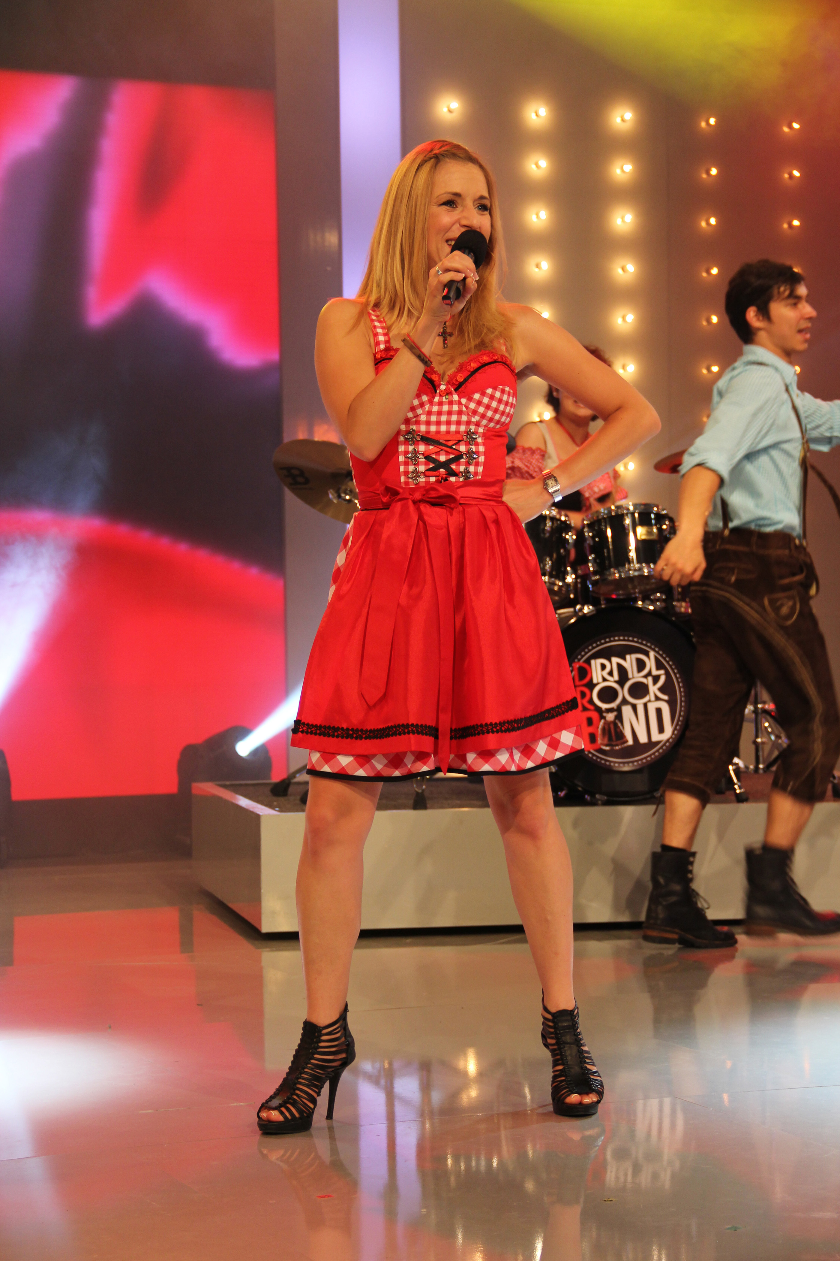 Stefanie Hertel bei der Aufzeichnung der HR Sendung "Hier spielt die Volksmusik" auf dem Hessentag 18.06.2013 in Kassel.